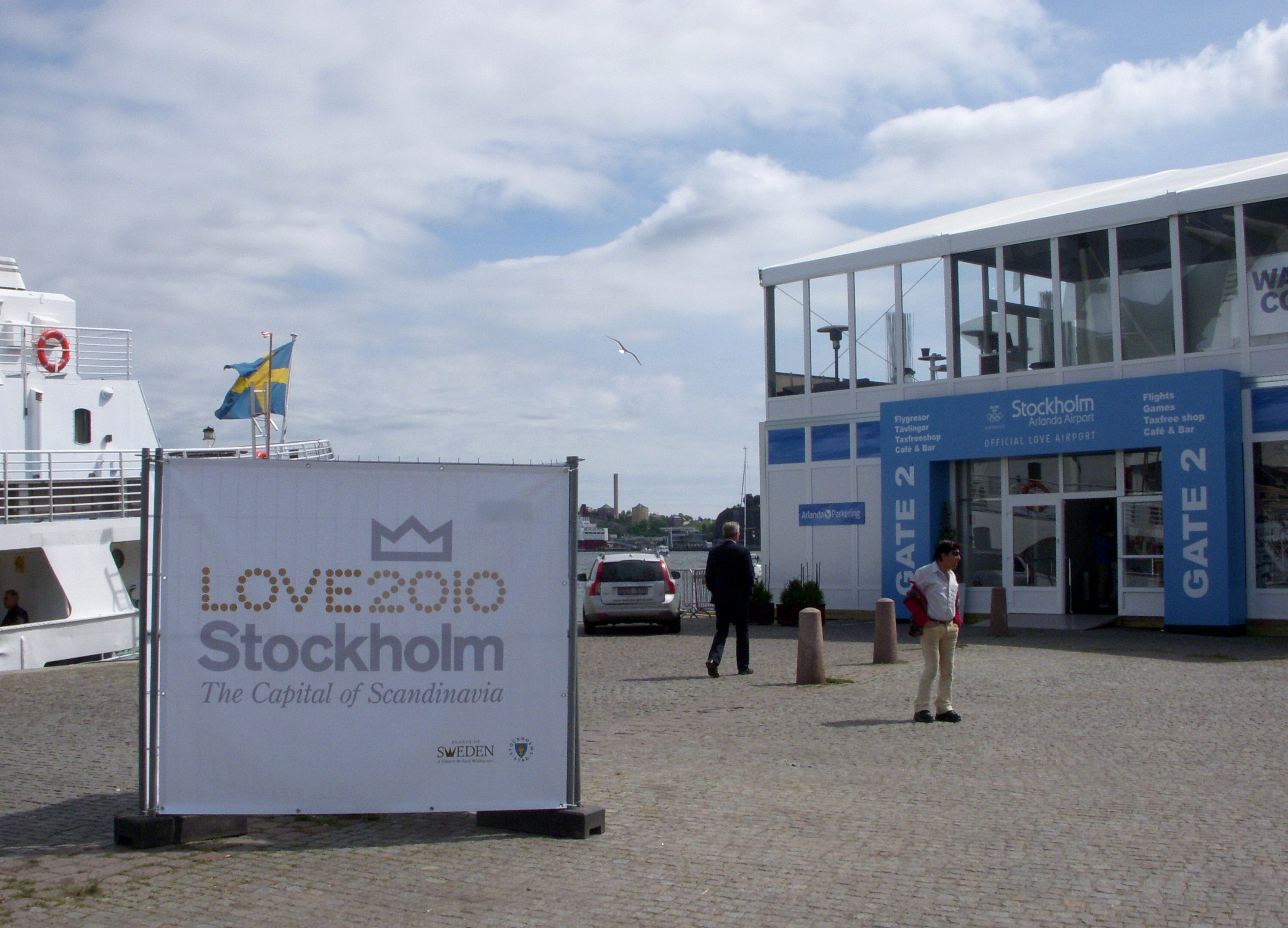 Skeppsbron och "Love Stockholm 2010"